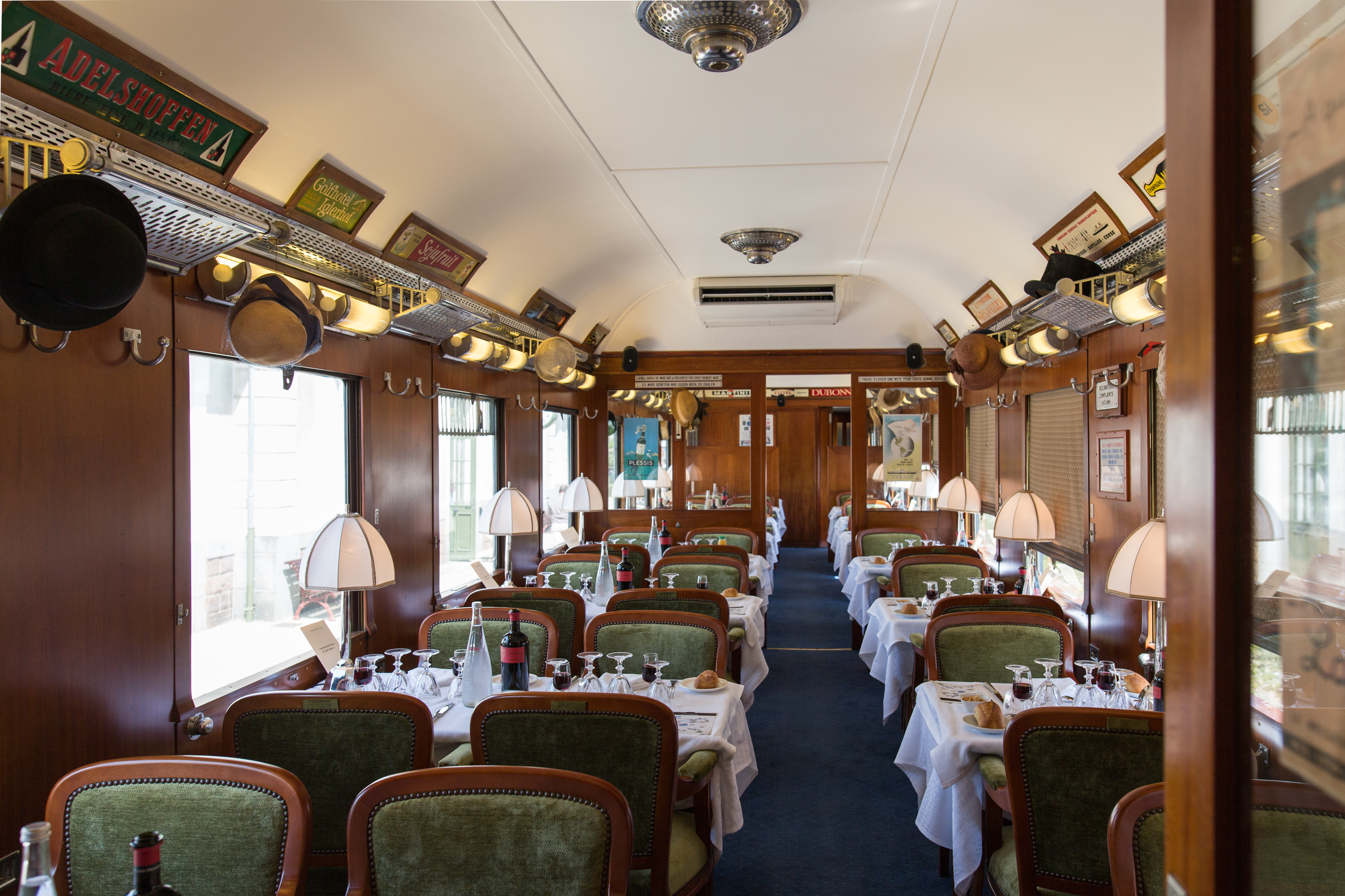 Intérieur de la voiture-restaurant CIWL 4216